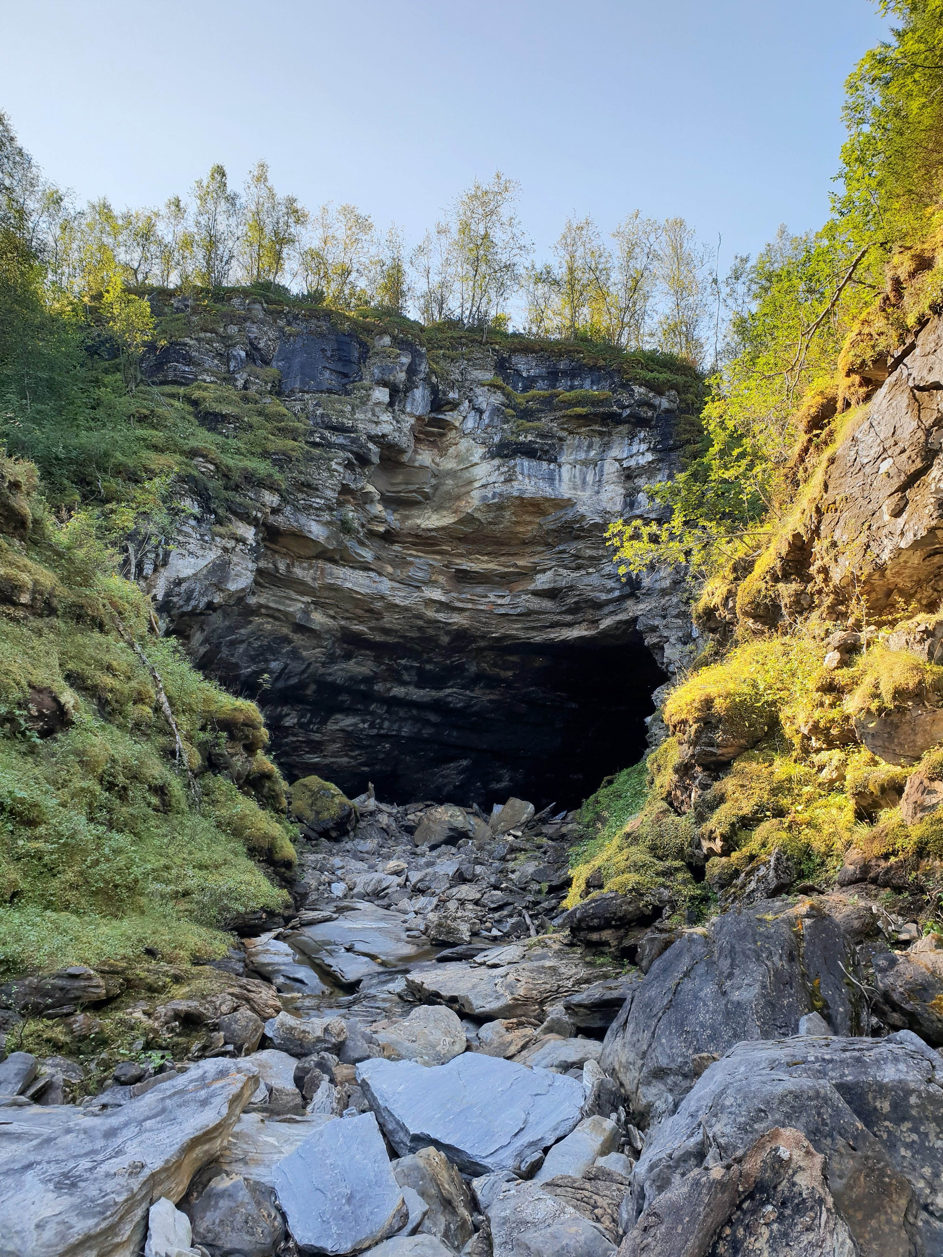 Inngangen til Okshola, Fauske kommune